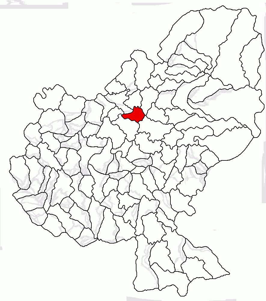 Categorie:Hărţi ale judeţului Mureş